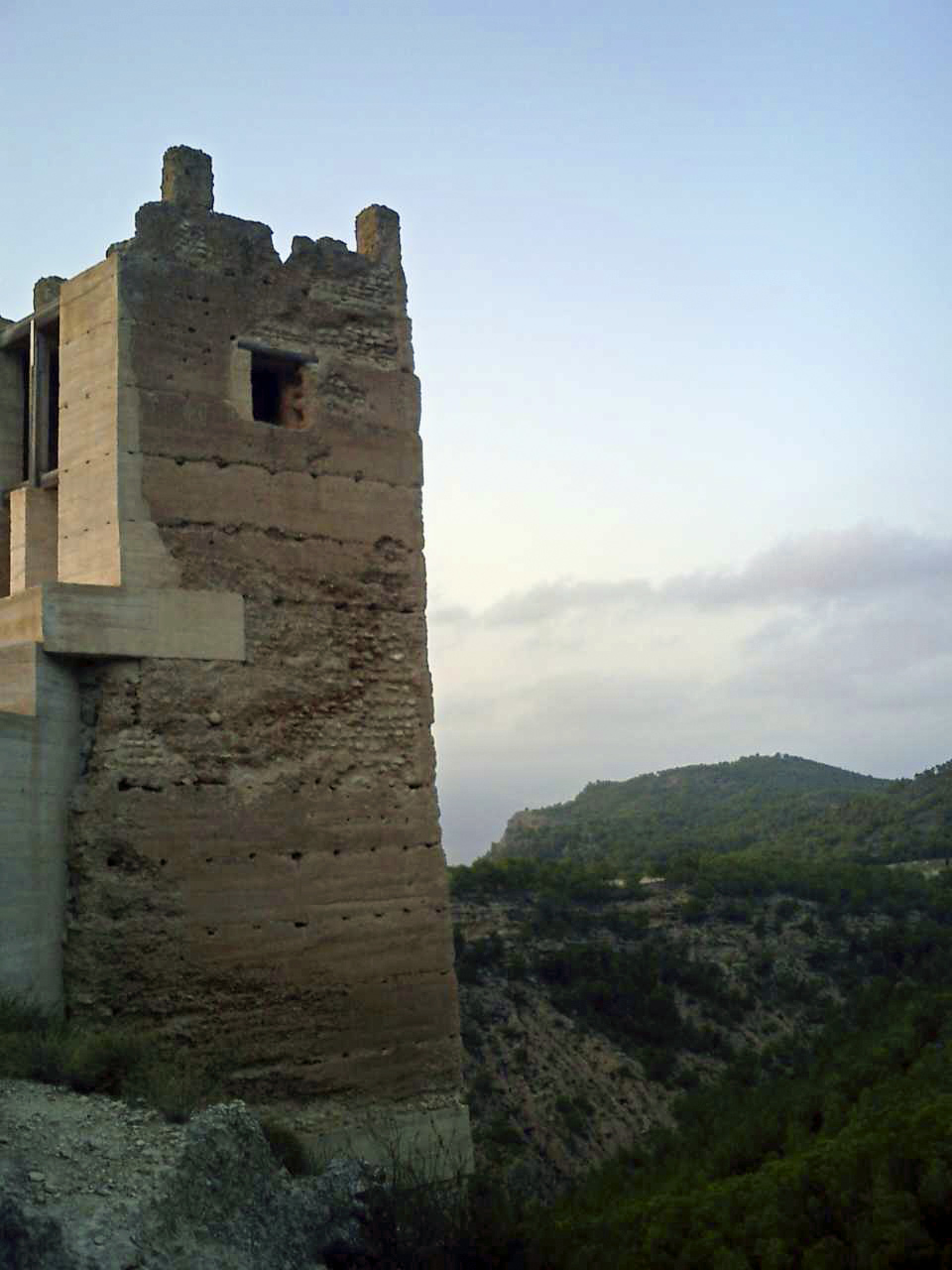 Torre del castillo de Pliego (Murcia).